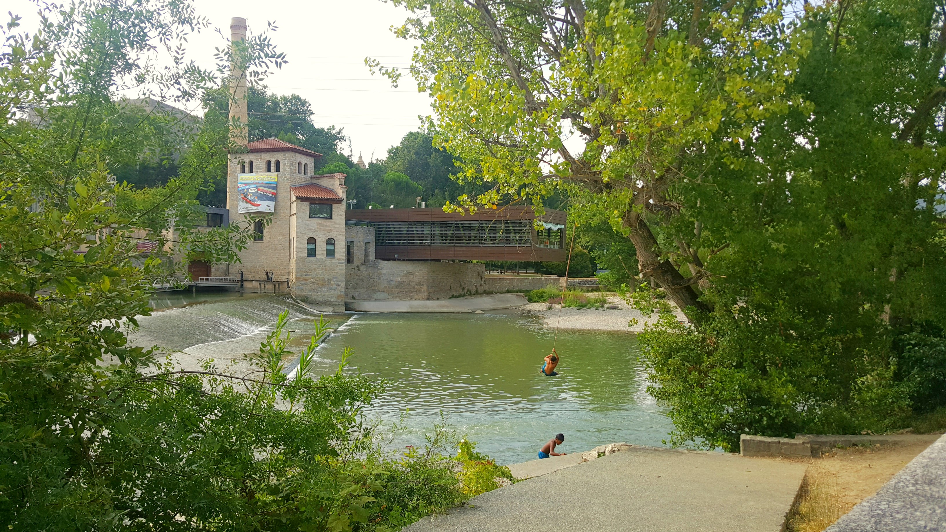 Umeak jolasean Arga ibaian Iruñean